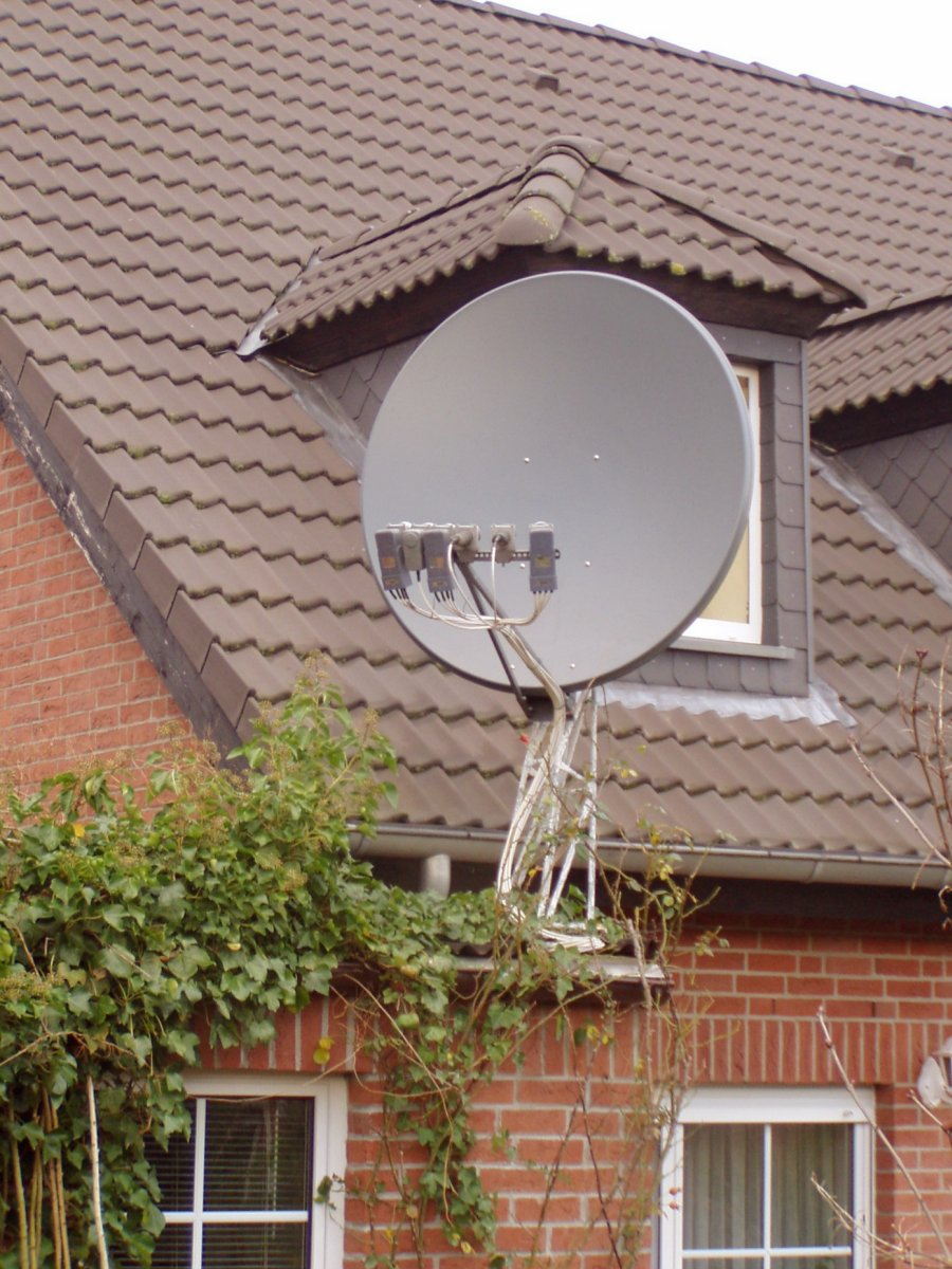 Eigenbau Multifeed-Halterung an einem 125'er Gibertini Parabolspiegel.